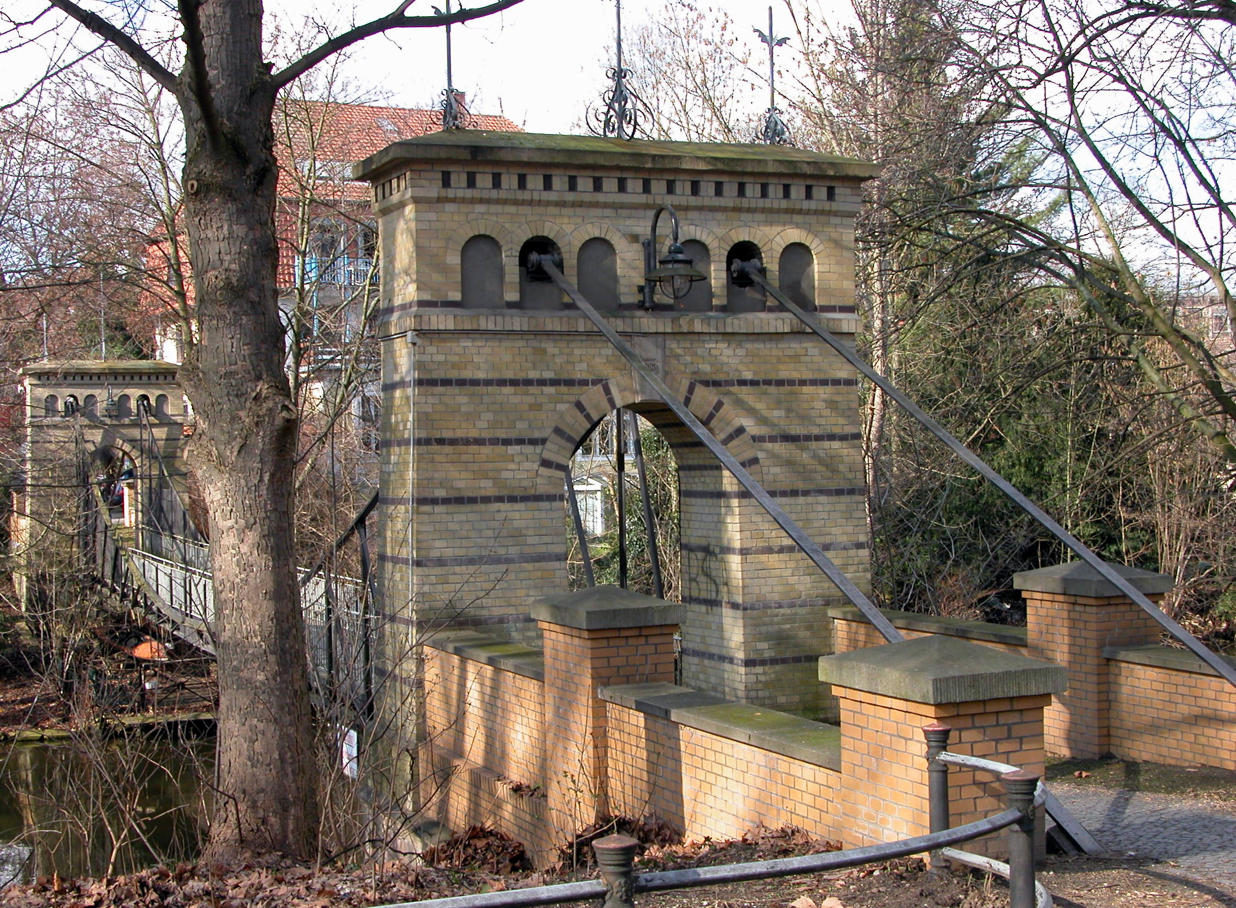 Braunschweig: Rosental-Brücke von der Innenstadt aus gesehen.